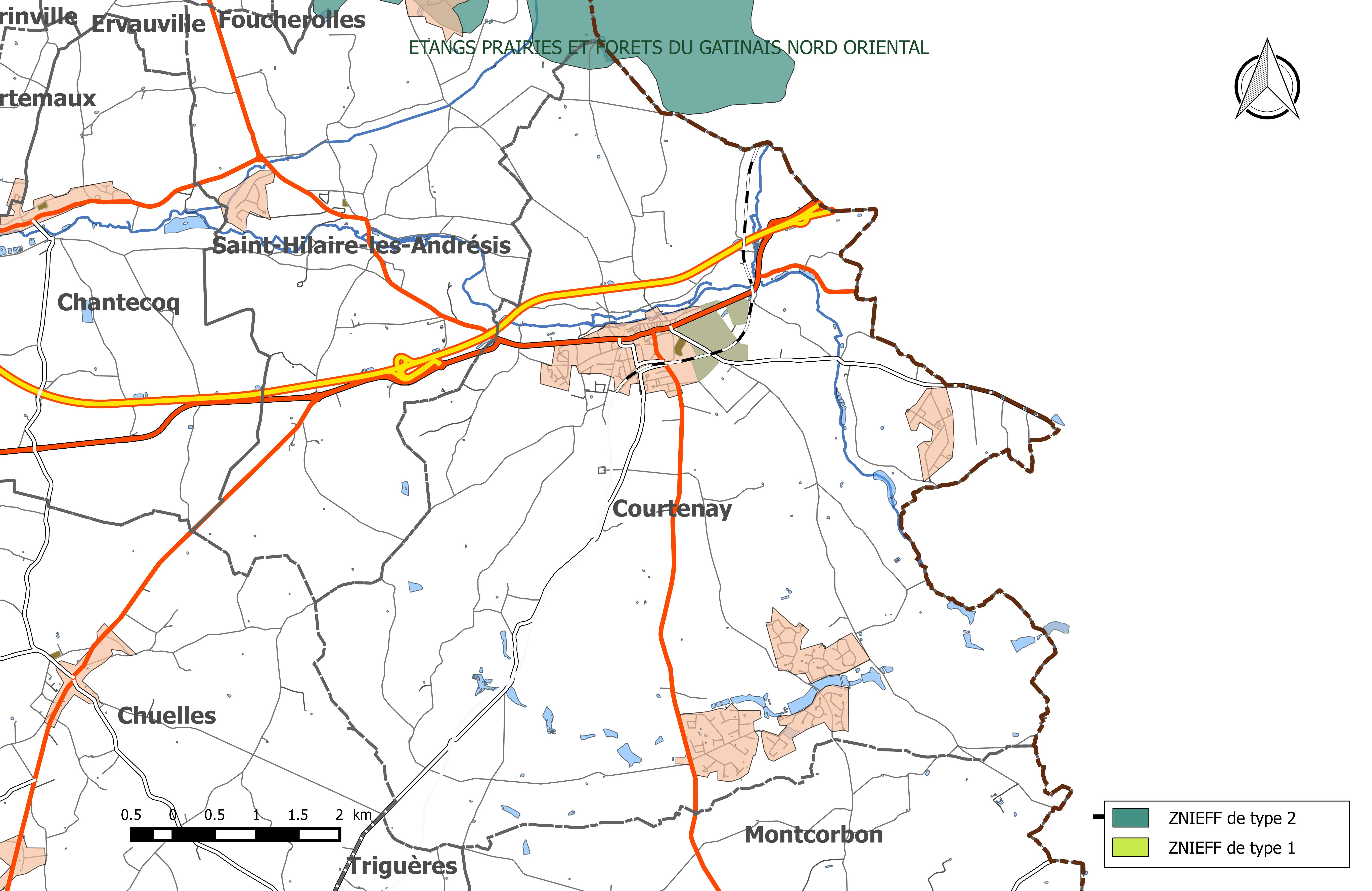 Carte des Zones naturelles d'intérêt écologique faunistique et Floristique (ZNIEFF) de la commune de Courtenay (Loiret).